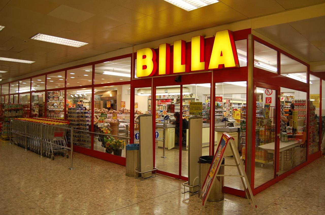 BILLA Supermarket under Vienna Airport